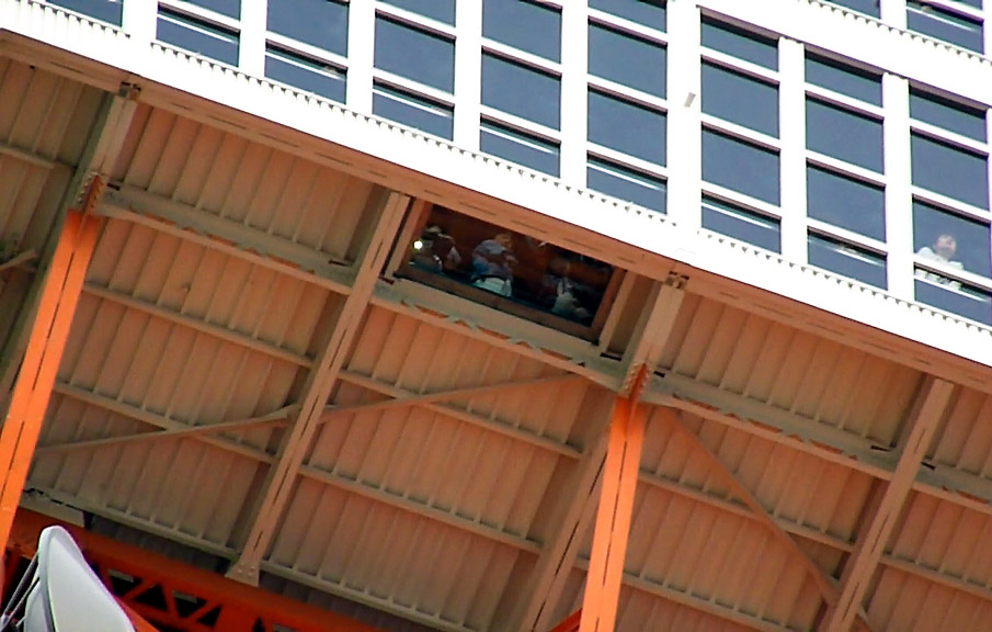 東京タワー大展望台のルックダウンを外から撮影。